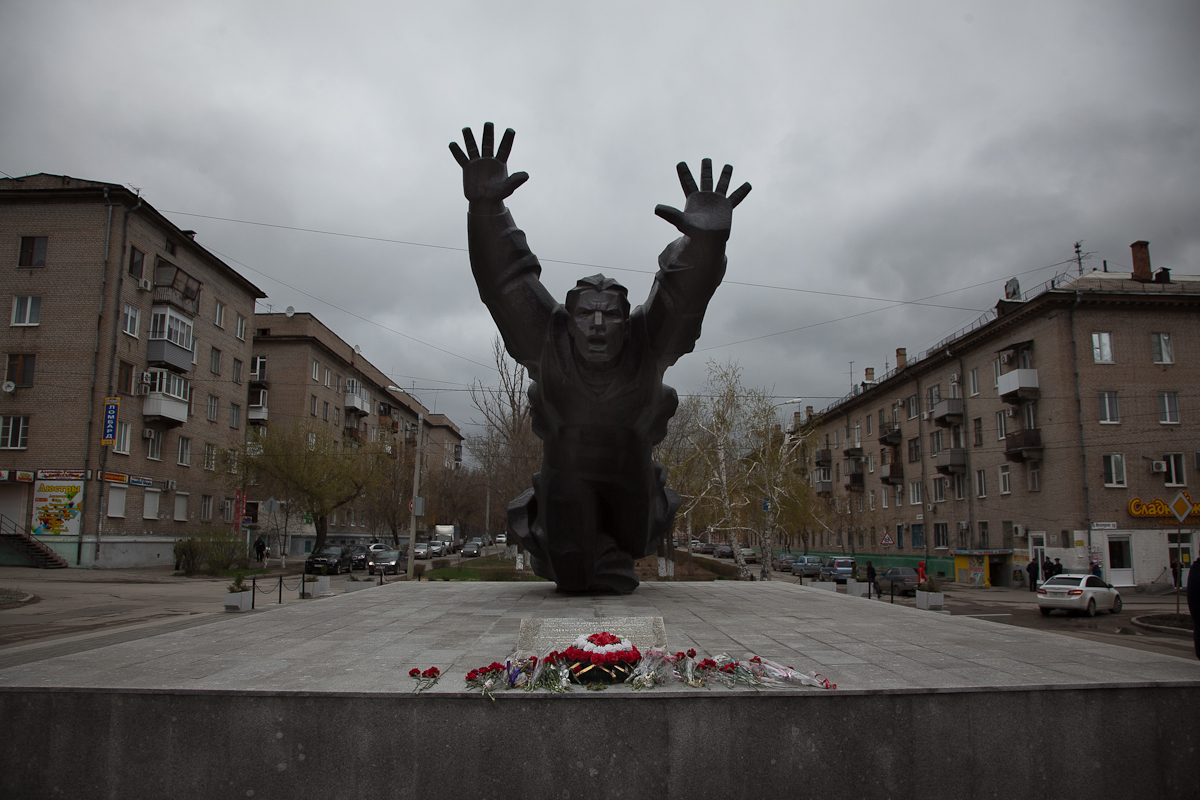 Памятник Михаилу Паникахе в Волгограде